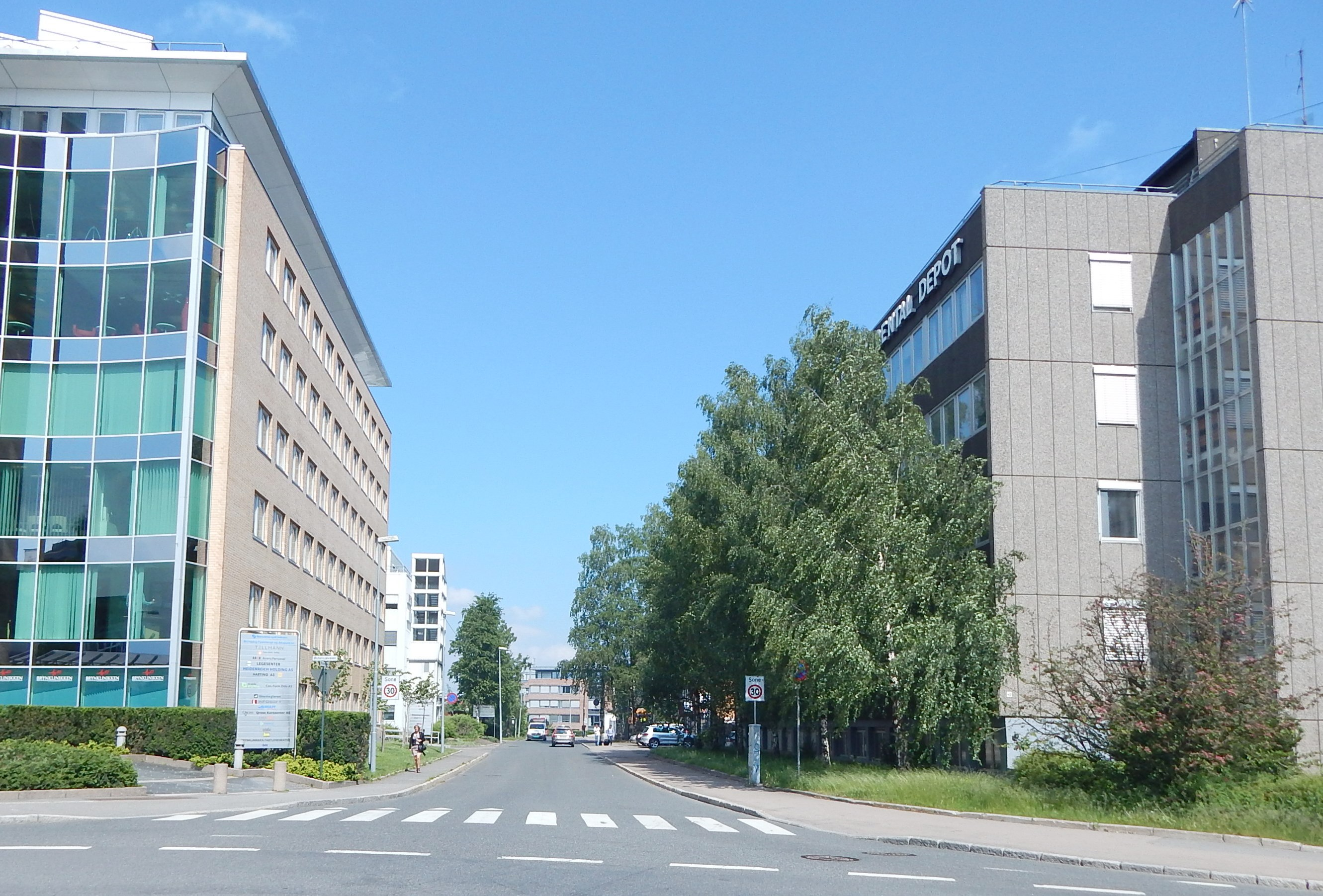 Brynsengveien sett fra Østensjøveien